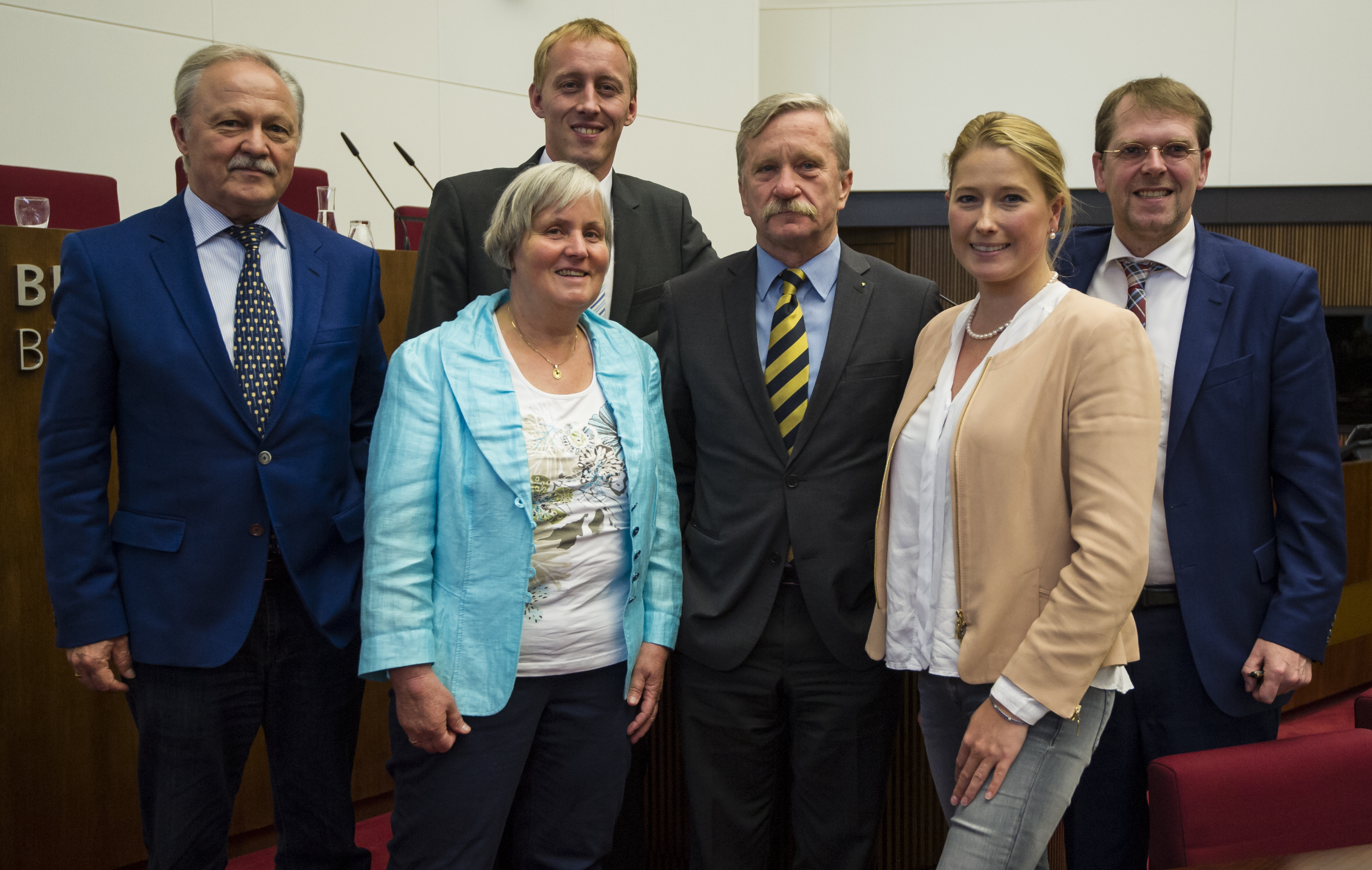 Die FDP in der Bremer Bürgerschaft